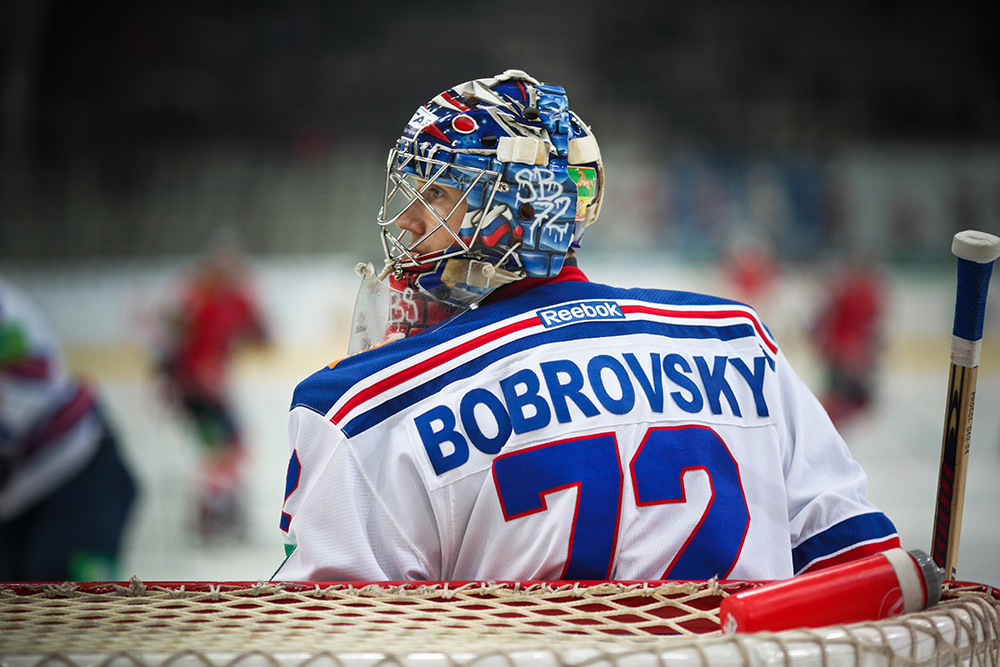 Вратарь СКА Сергей Бобровский во время матча чемпионата КХЛ против новокузнецкого «Металлурга» 19 декабря 2012 года.